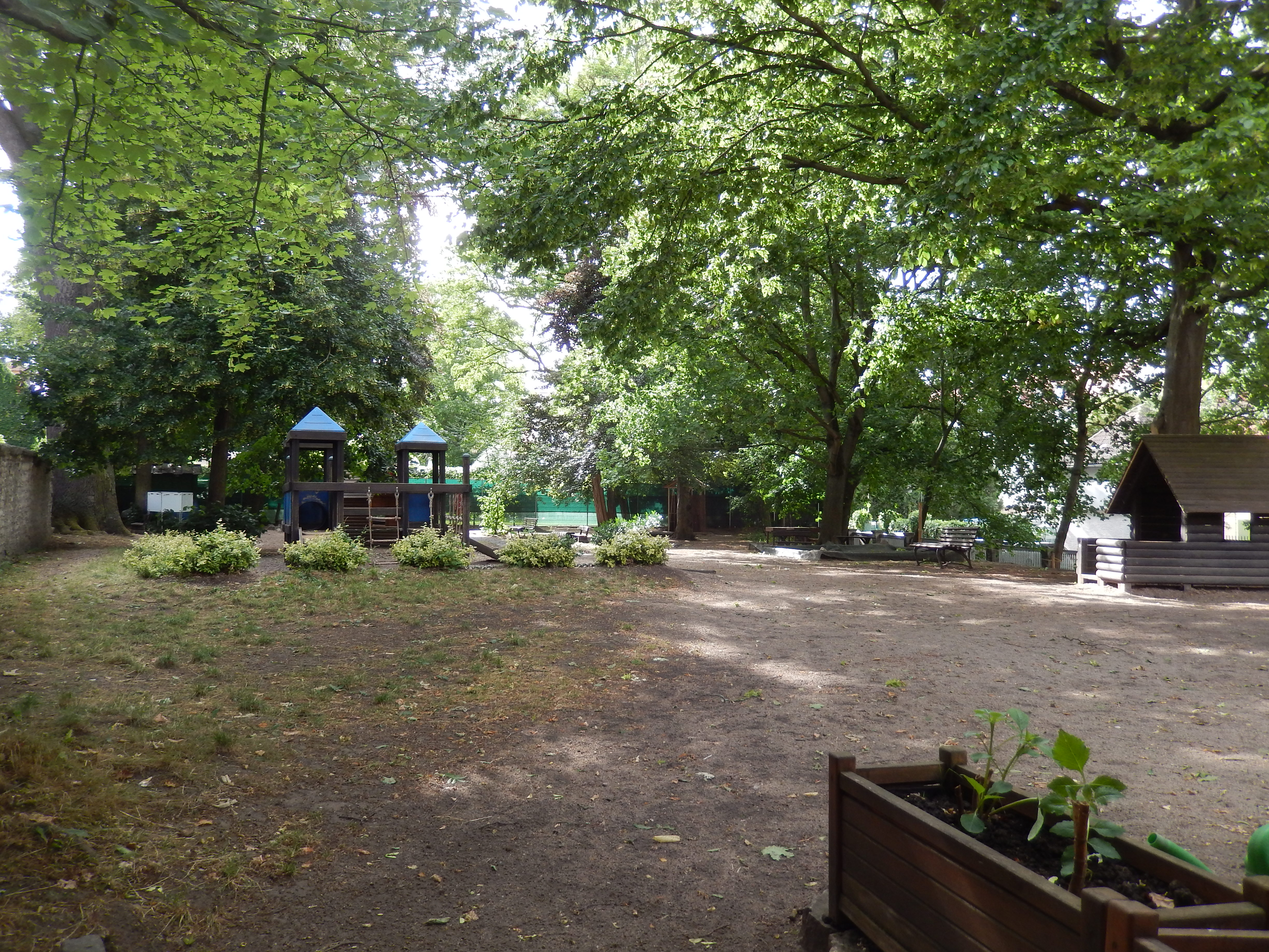 Oppelscher Garten in Weimar